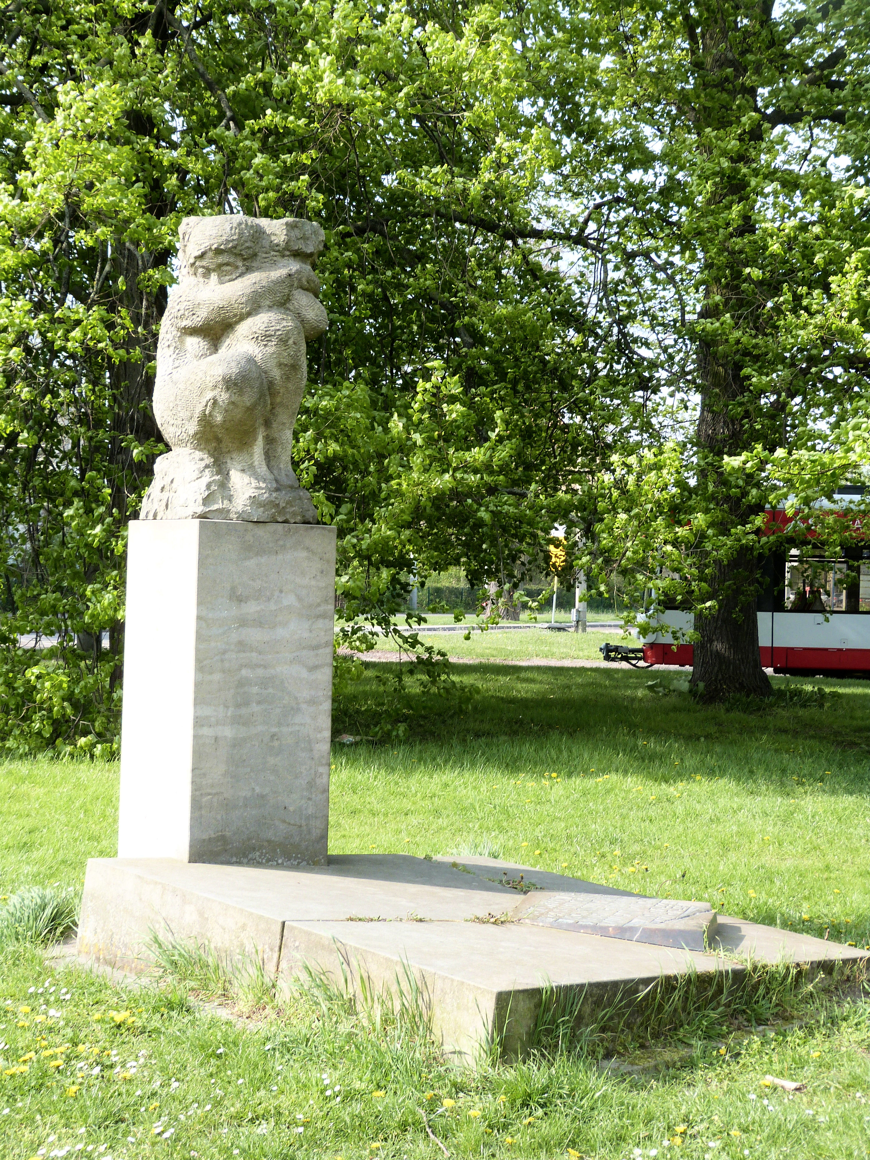 Denkmal für die Opfer des KZ-Außenlagers Birkhahn der Siebel Flugzeugwerke Halle-Mötzlich, Dessauer Straße, Bildhauer: Bernd Kleffel, 2009